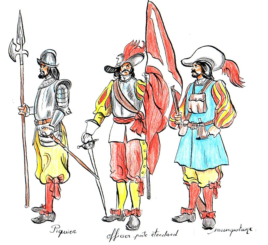 dessin personnel de Jp.negre